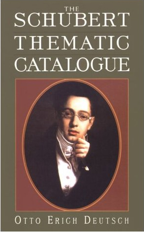 THEMATIC-CATALOGUE